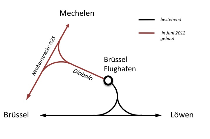 Plan des Diabolo Eisenbahn Projekts in Belgien